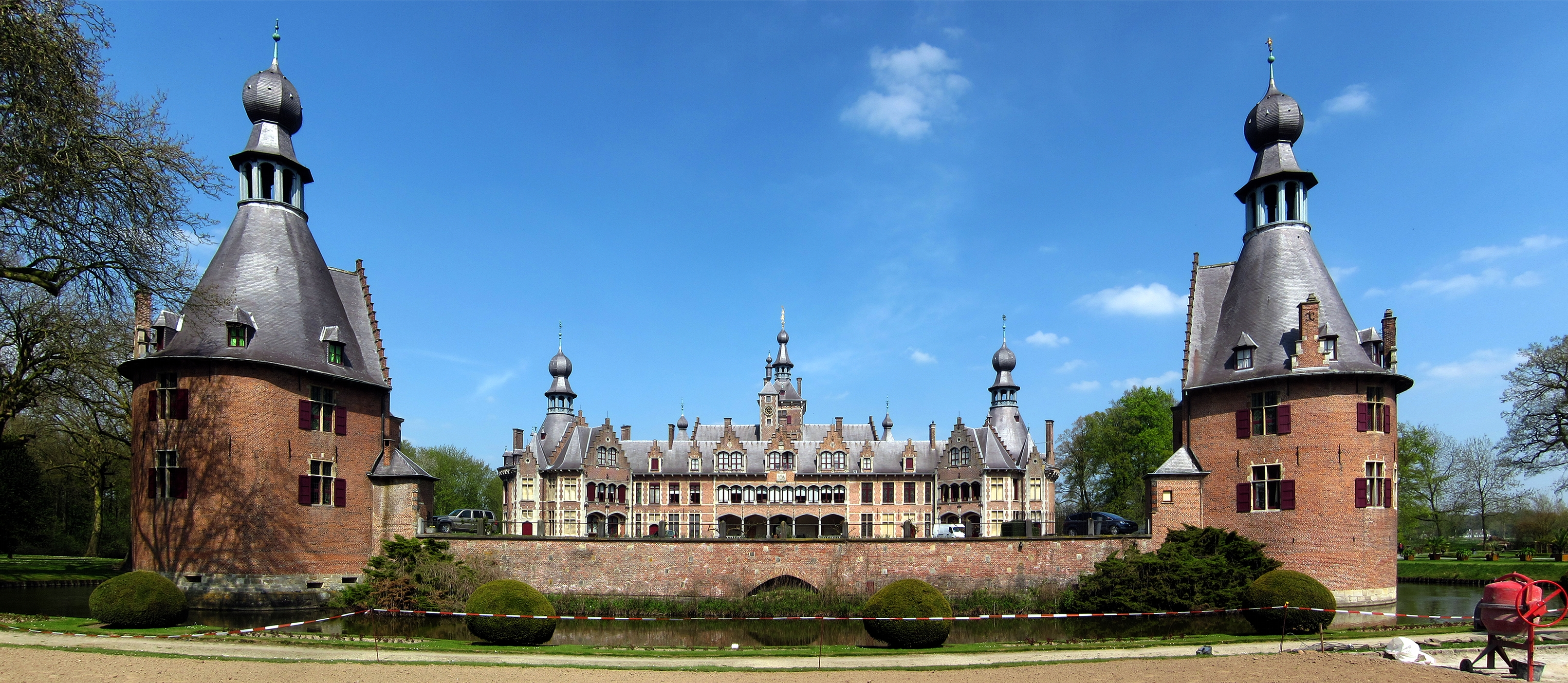 Vu générale du château de Ooidonk.